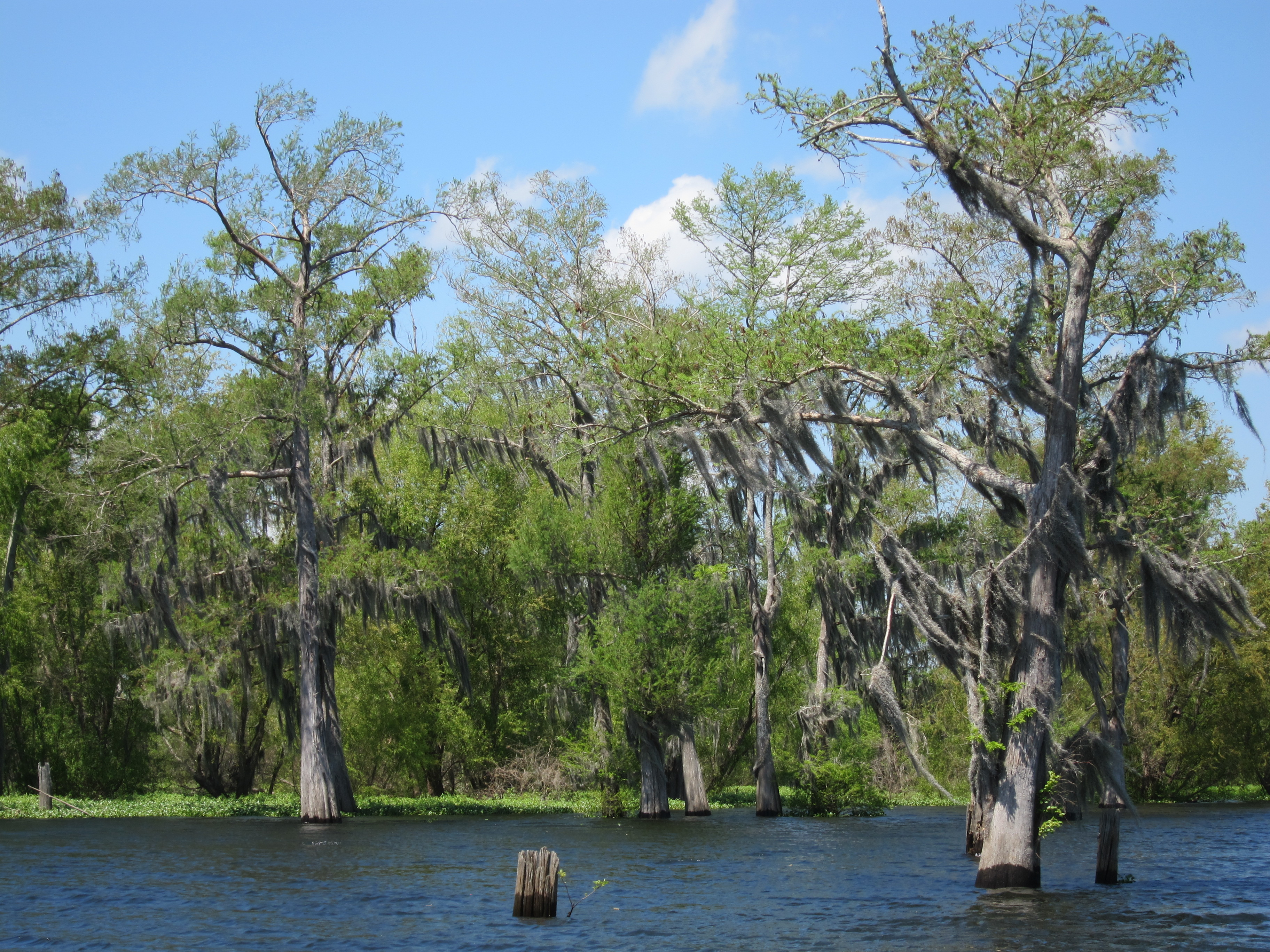 Atchafalaya swamp tour, Louisiana.